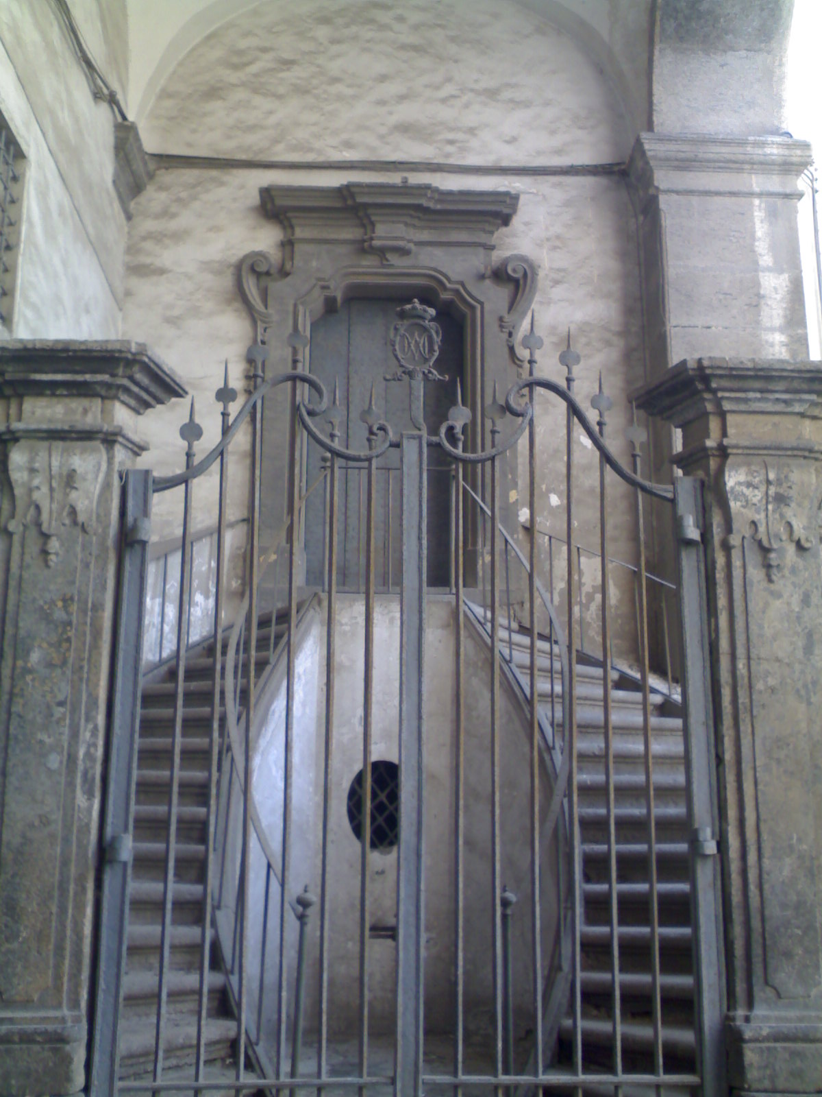 Congrega dei Bianchi alla Giustizia (Napoli)